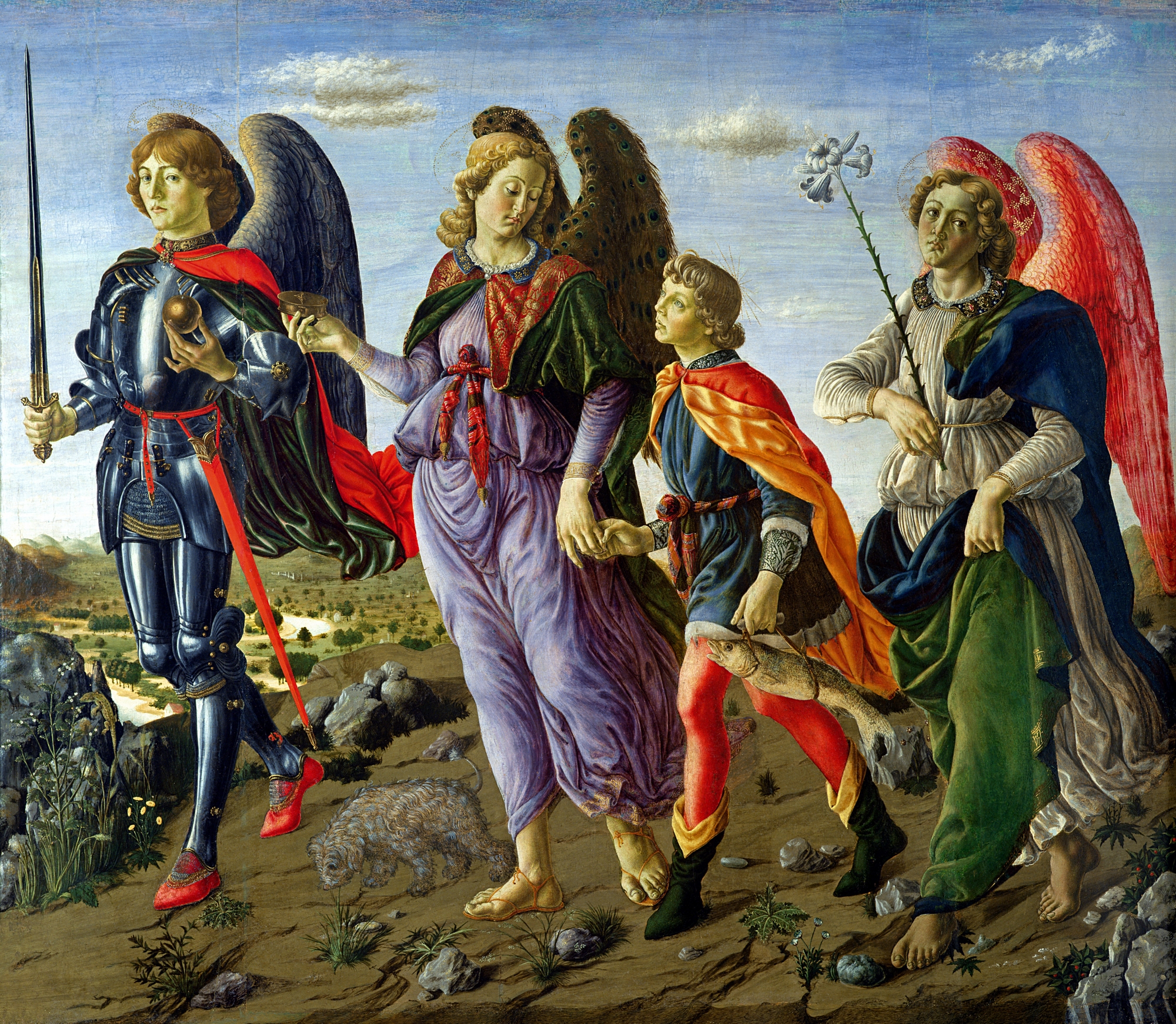 Linker Engel: MichaelMittlerer Engel: RaphaelJunge: TobiasRechter Engel: Gabriel